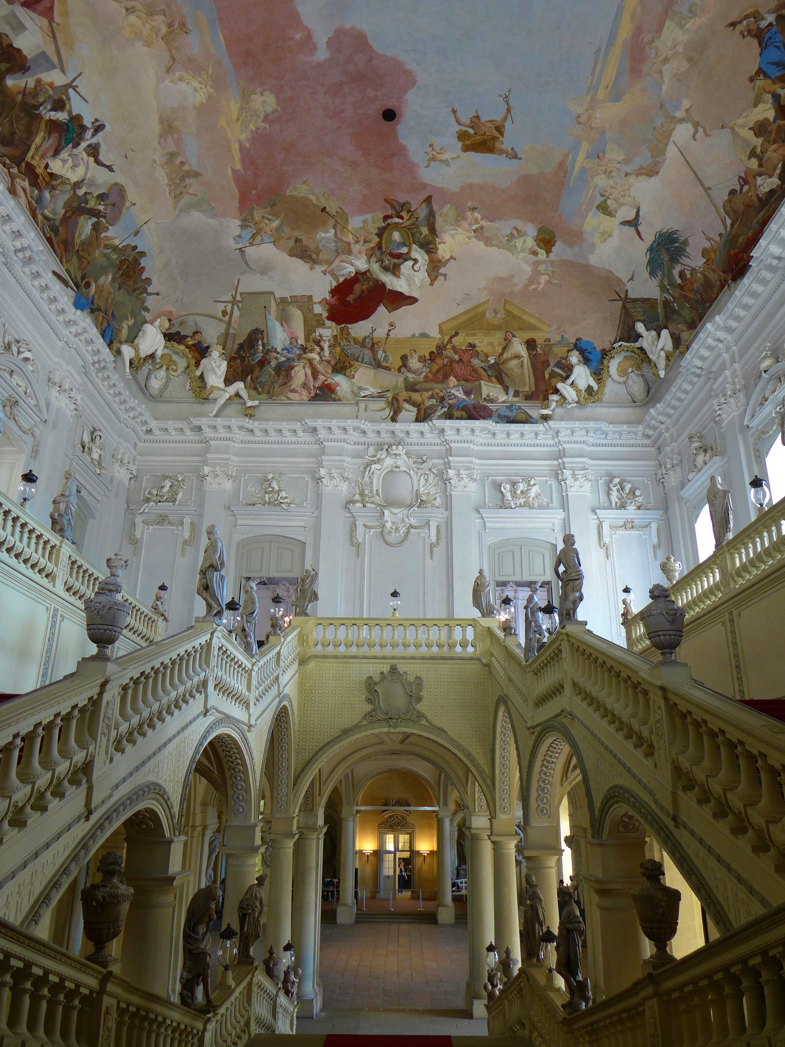 Treppenhaus der Würzburger Residenz